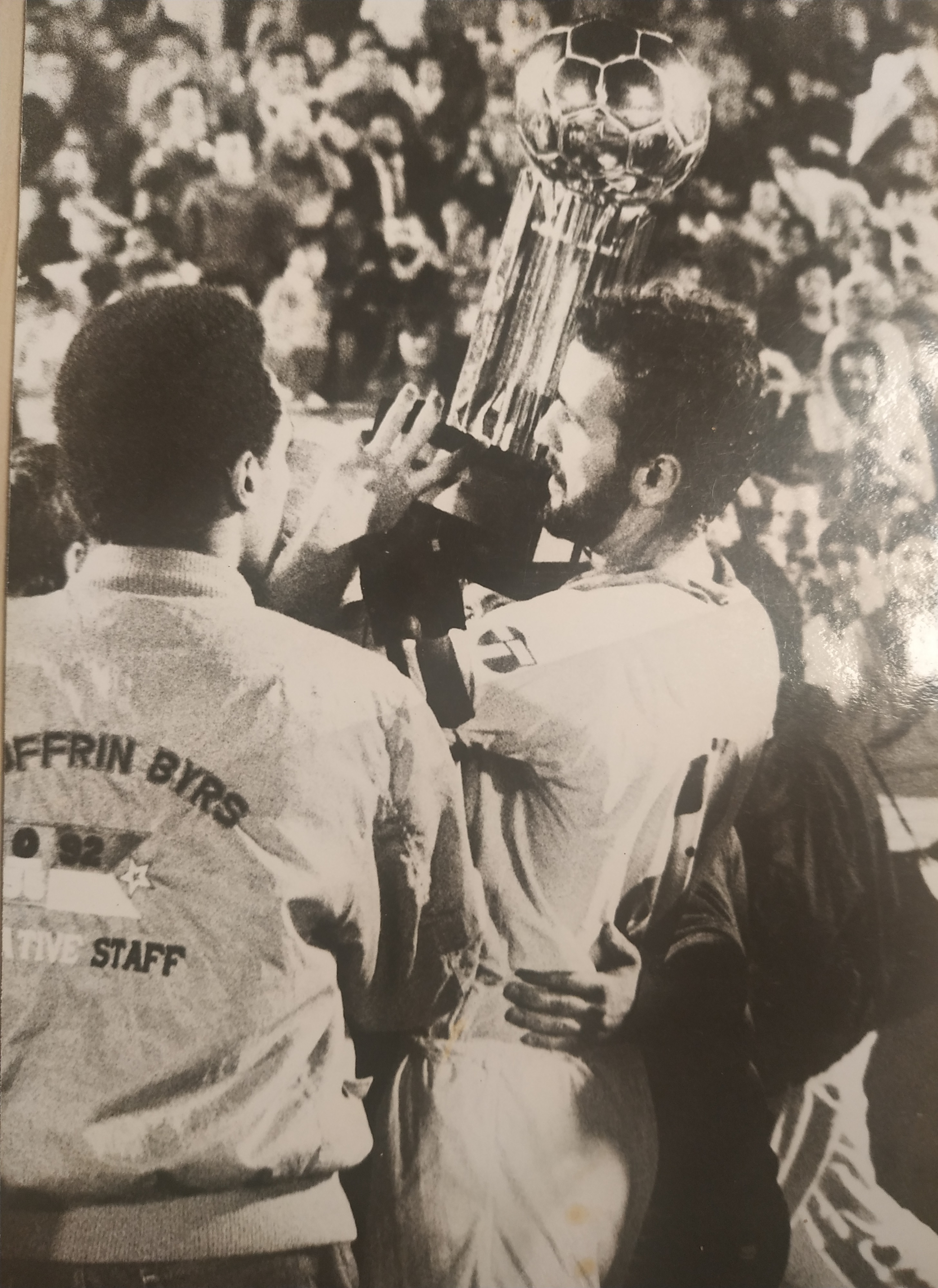 Rodolfo Pereyra junto a Hugo León, campeón de América 1988 con Nacional